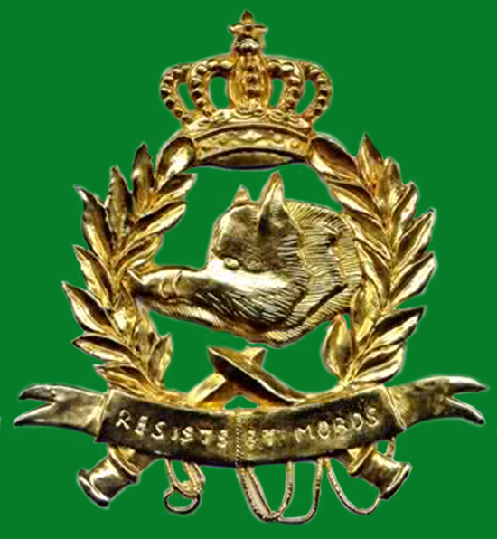 Barettabzeichen der Chasseurs ardennais